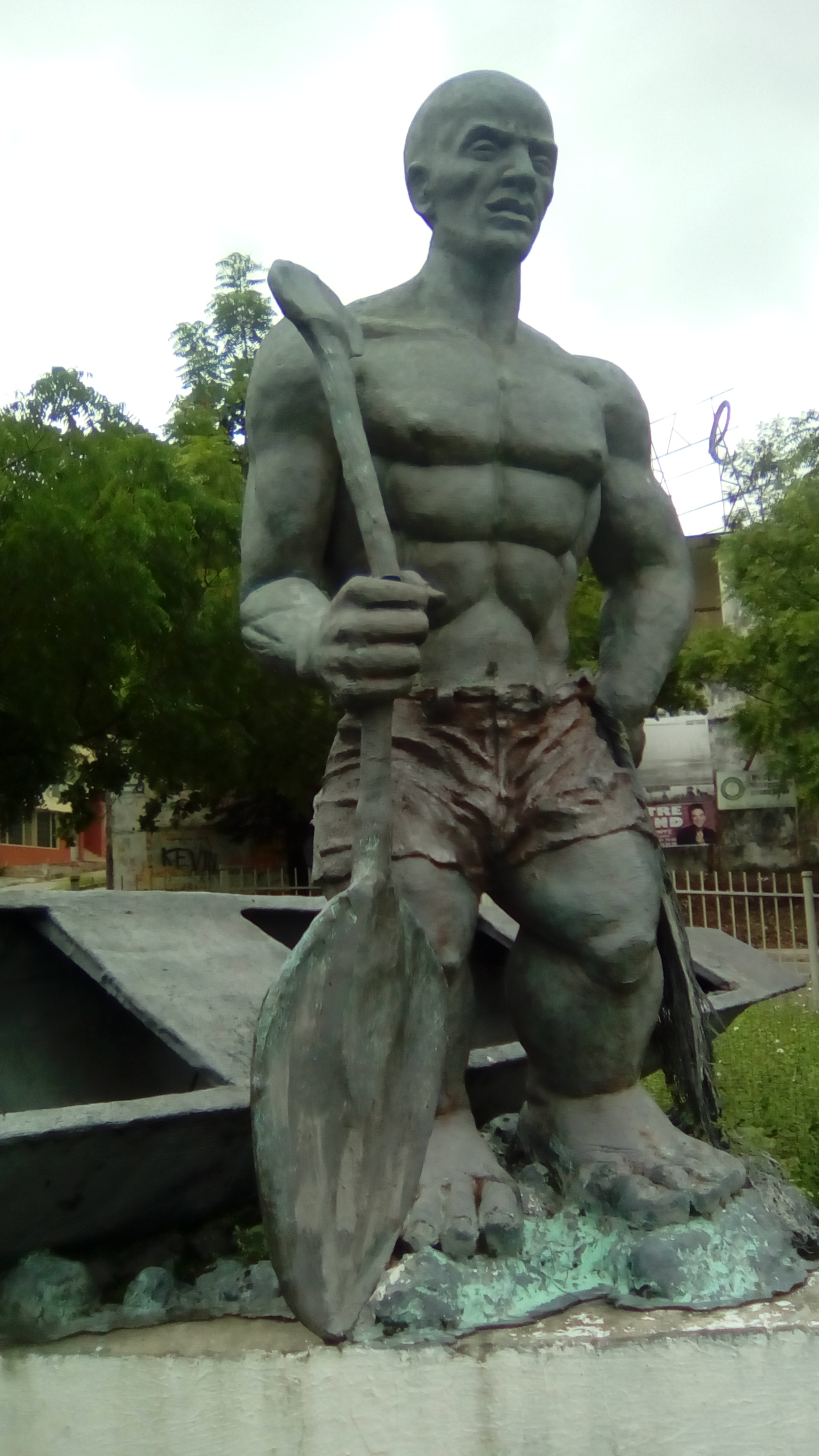 Monumento al pescador, también conocido como el Boga de la libertad, en la ciudad de Honda